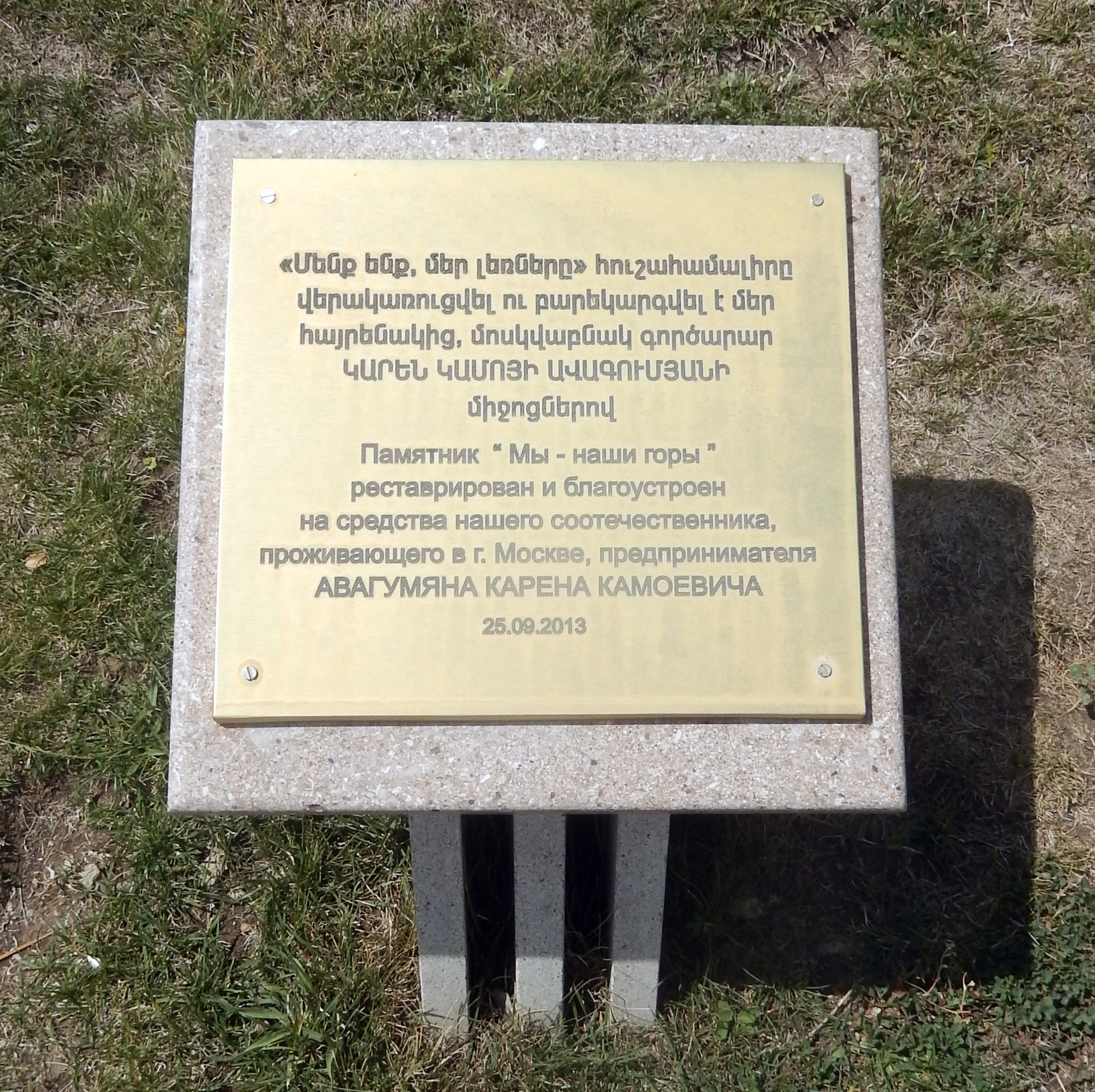 «Մենք ենք, մեր լեռները»